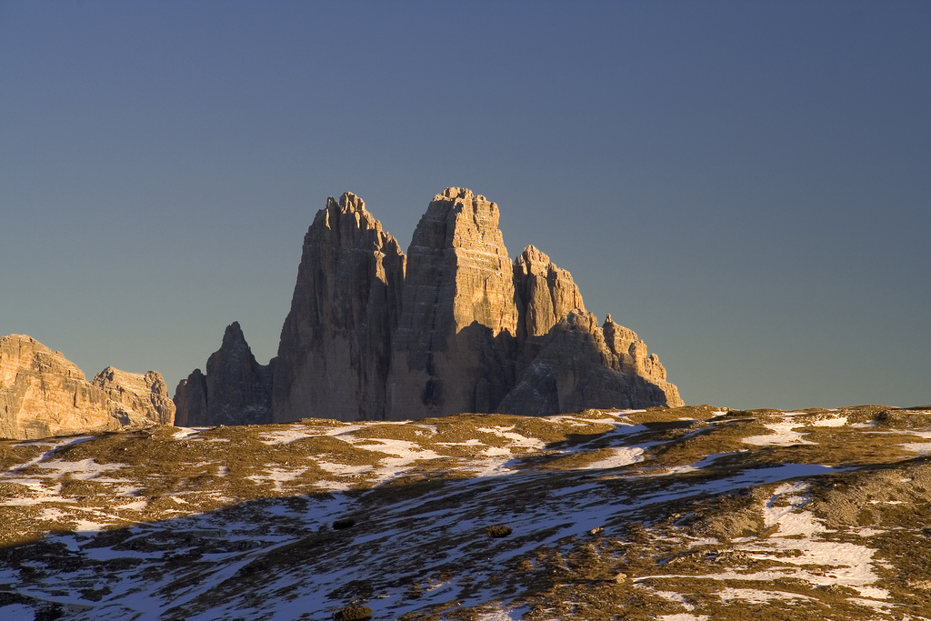 Drei Zinnen